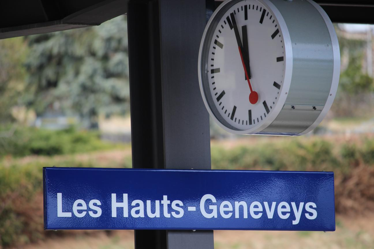 Panneau de la gare des Hauts-Geneveys, commune de Val-de-Ruz, quai 2, fond flou